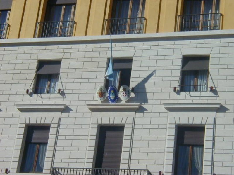 Roma, via della Conciliazione 16, Argentine embassy in Vatican City.